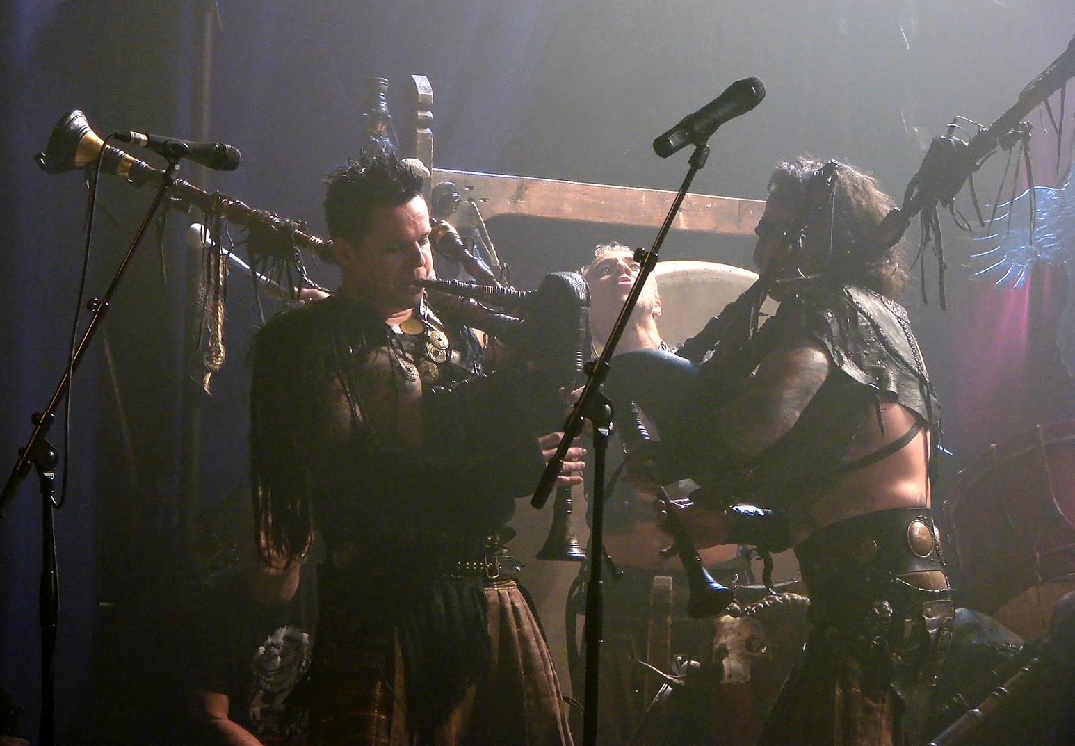 Corvus Corax au Cernunnos Pagan Fest, organisé par les Acteurs de l'Ombre à la Machine du Moulin Rouge, le 24 Février 2013 à Paris.